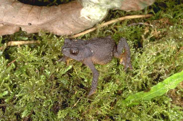 Bufo manu